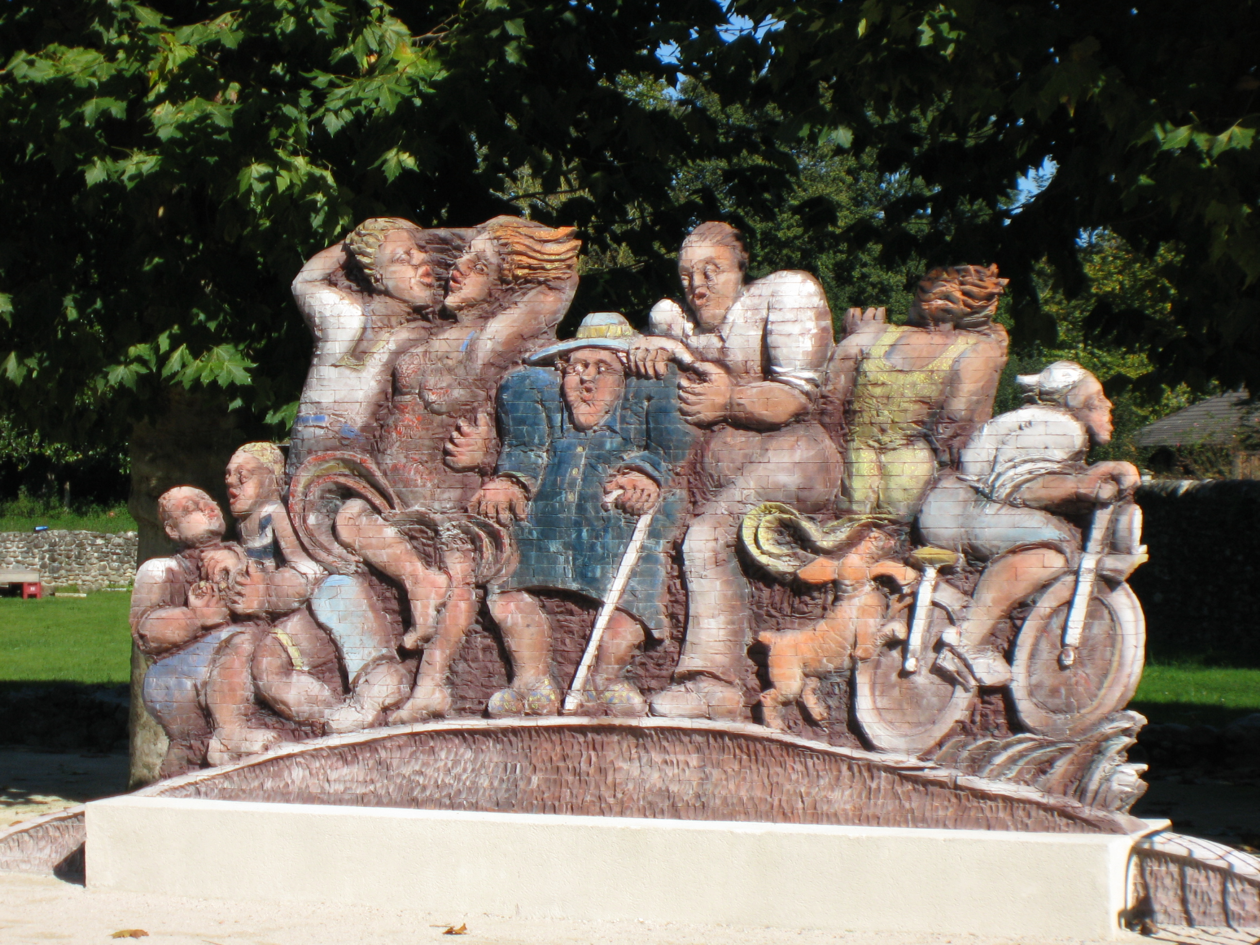 Vue d'une oeuvre composée de briques près de l'église de Précilhon (Pyrénées-Atlantiques) Pyrénées).